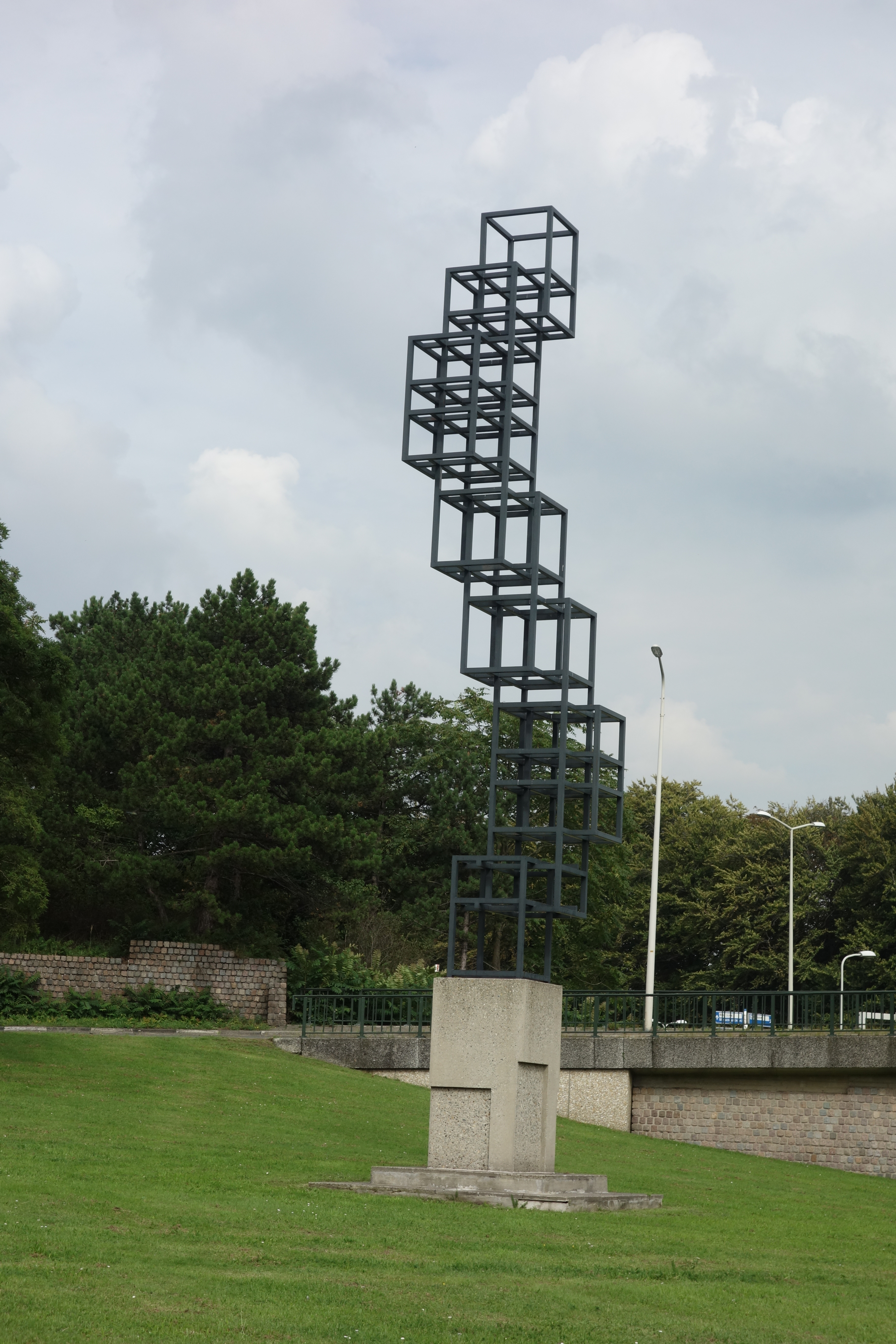 Den Haag, Plesmanweg. Kunstwerk "Synthetische constructie F8-1B" (1978) van Joost Baljeu. Den Haag (Nederland)